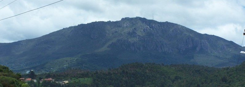 Serra da Piedade (Vista de Caeté), Caeté - MG, Brasil.